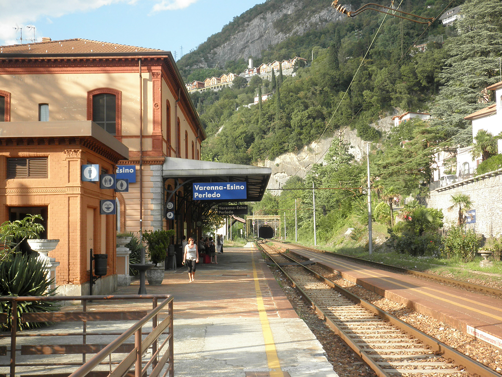 Stazione ferroviaria di Varenna-Esino-Perledo, il piazzale binari.